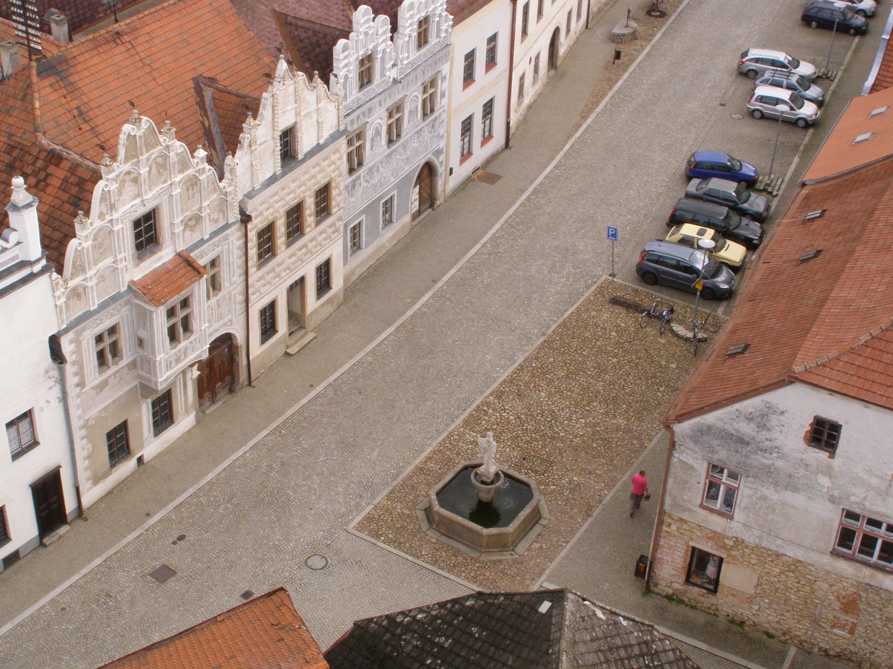 Slavonice, pohled z věže kostela Nenebevzetí Panny Marie na Horní náměstí, dole uprostřed kašna se sochou sv. Floriána